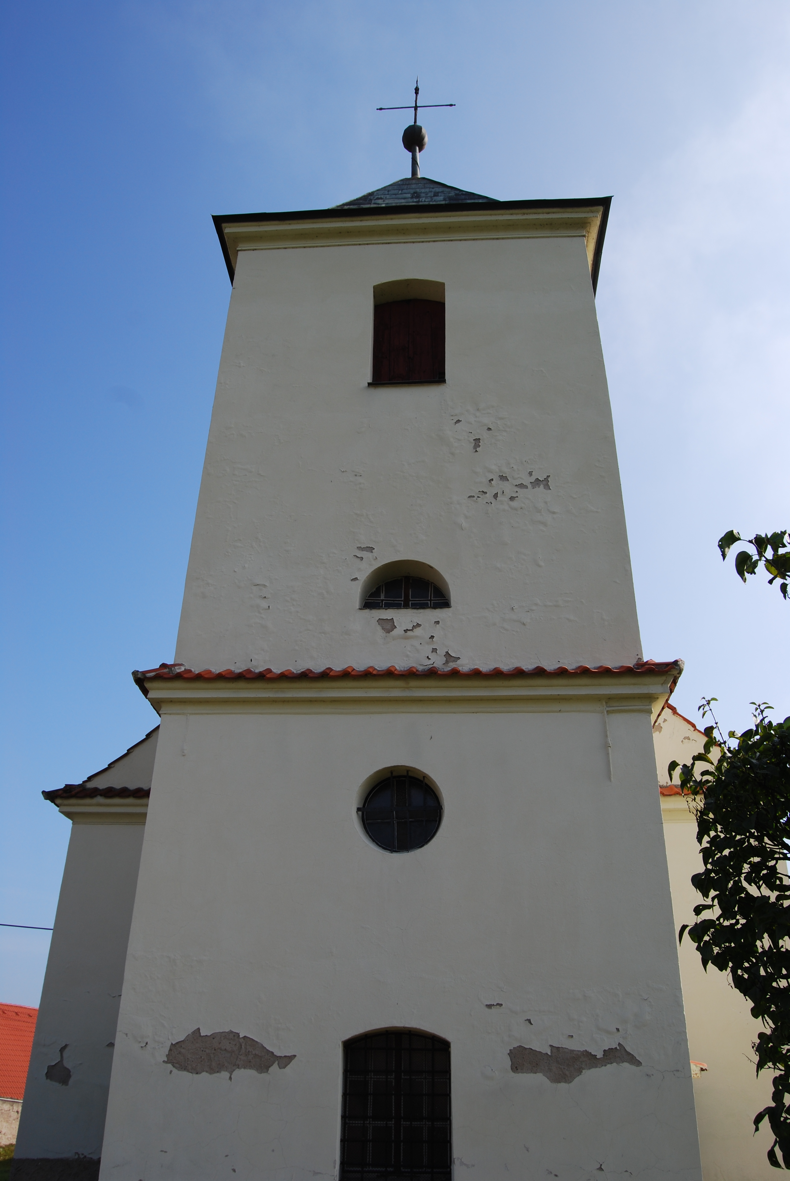 Věž kostela sv. Václava, Brozánky (Řehlovice)